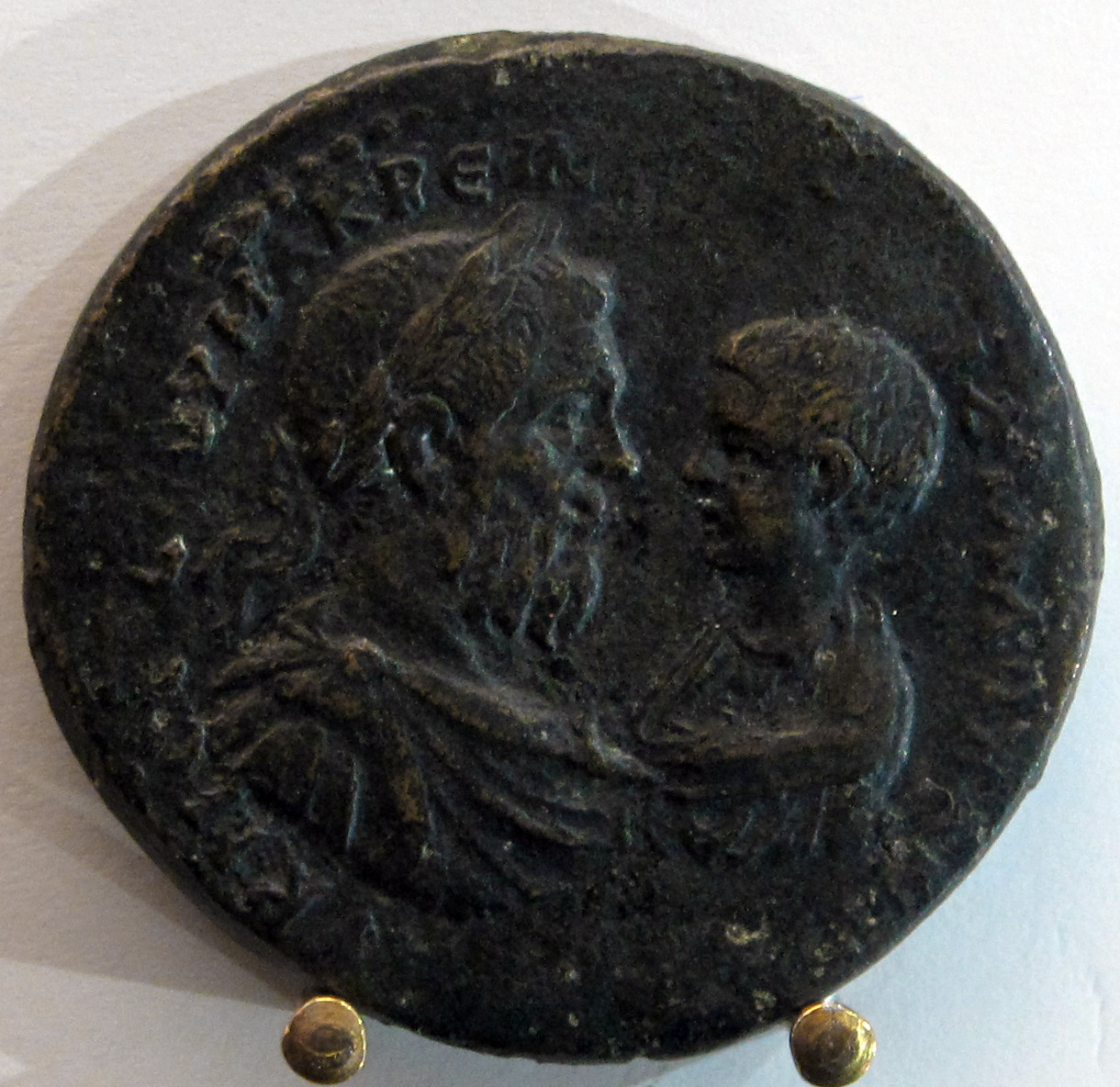 Medaglione di macrino e diadoumeniano, zecca di cesarea-cappadocia, busti affrontati